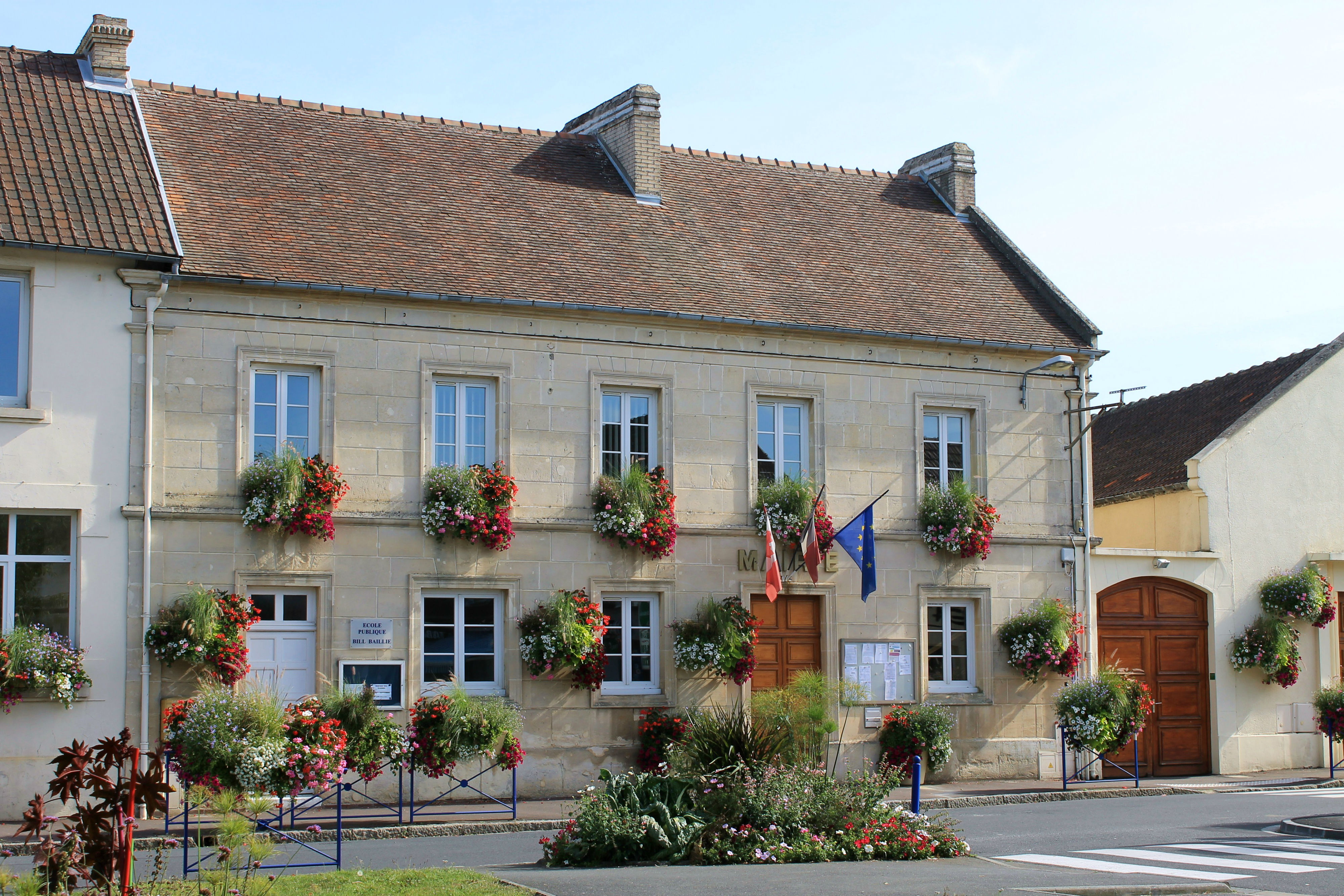 Mairie d'Authie (Calvados)